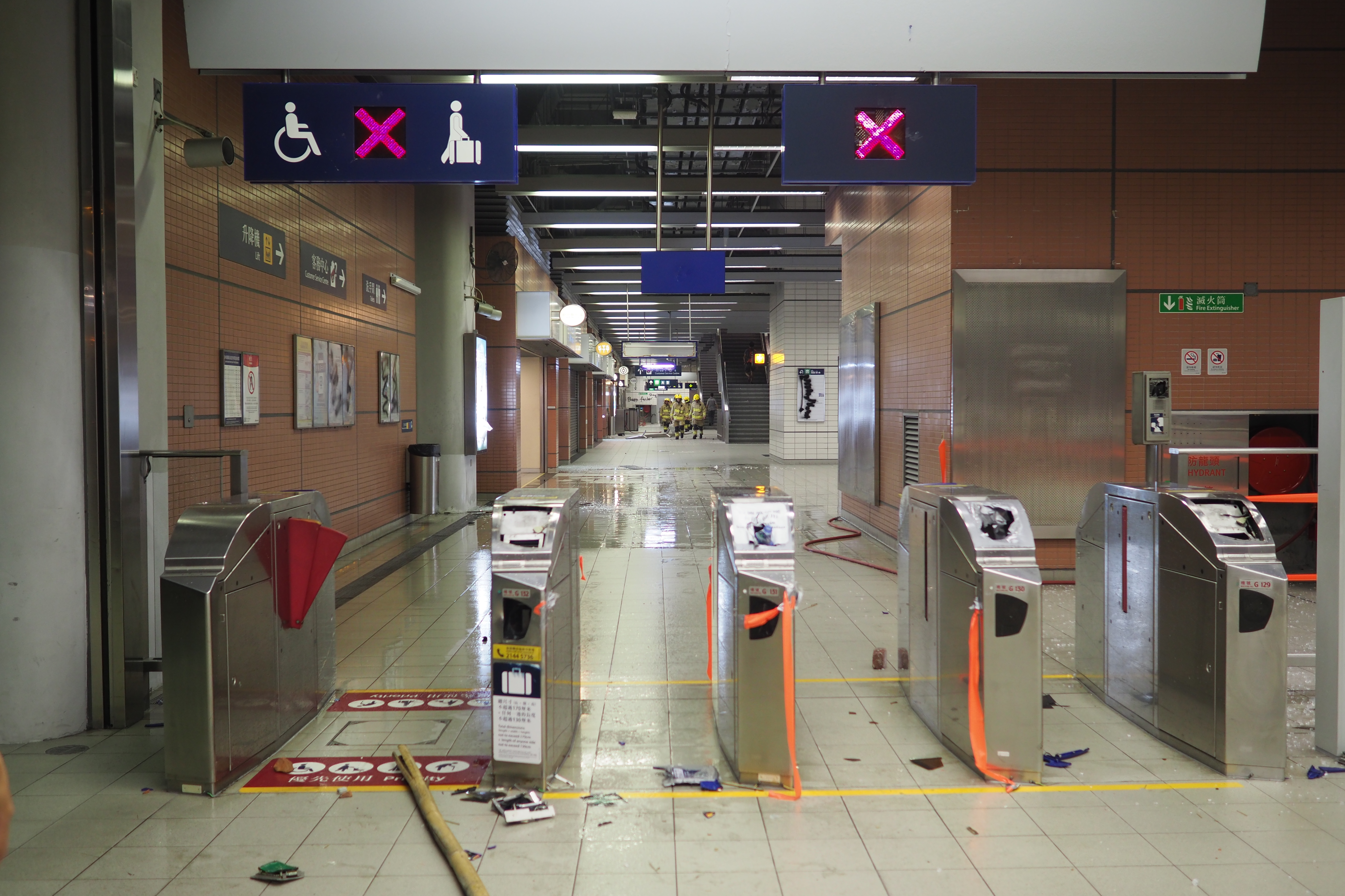 2019-10-04 Protesten in Hong Kong